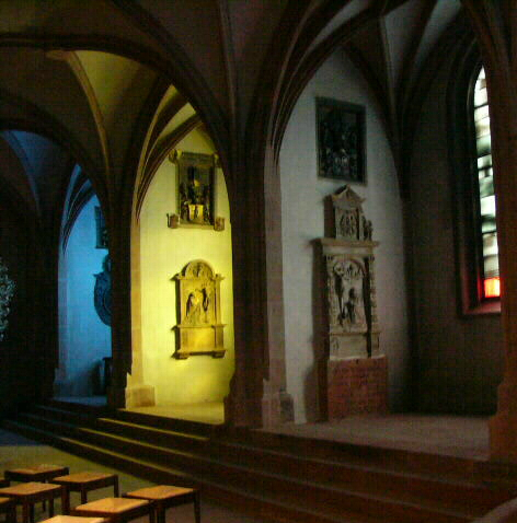 Farbenspiel in der Sepulturkapelle im Würzburger Dom